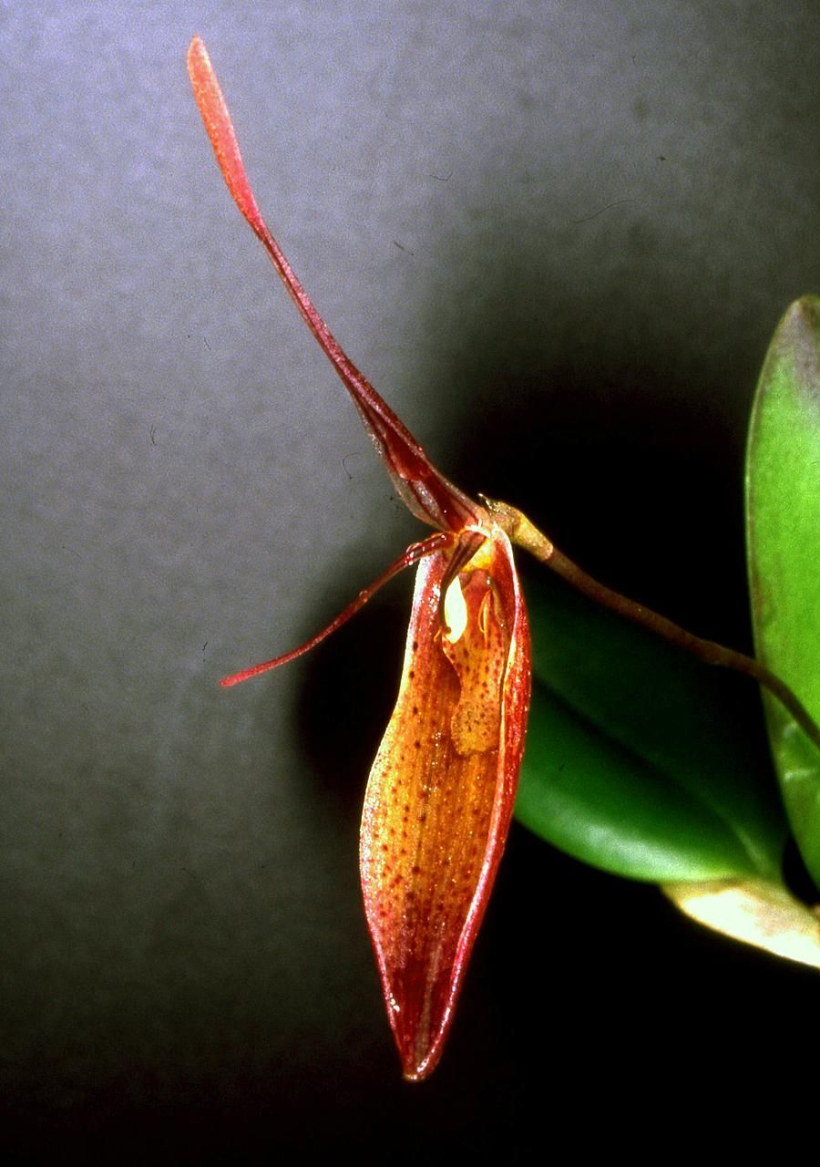 Restrepia teaguei - flower